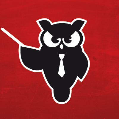 Erudio sin logo.